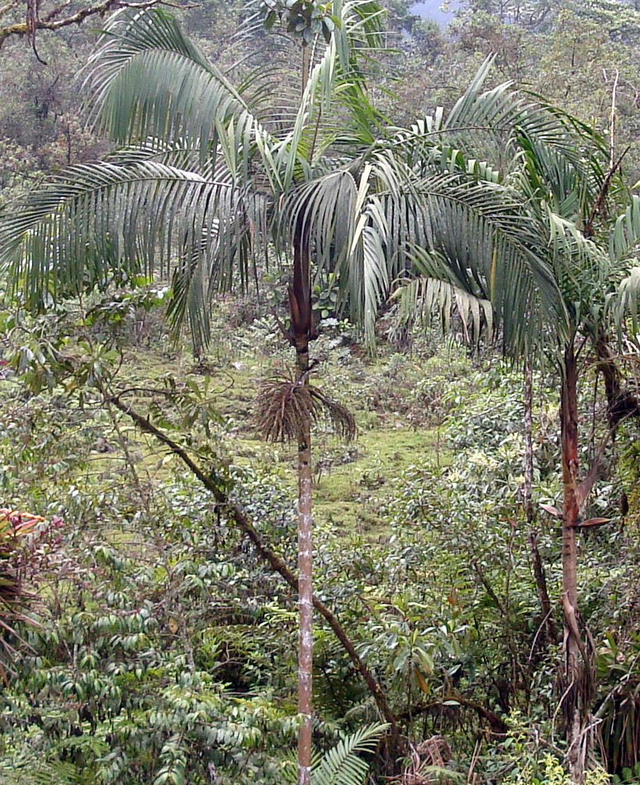 como no vi la imagen, entiendo que es este ejemplar